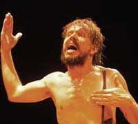 Julio Adrião